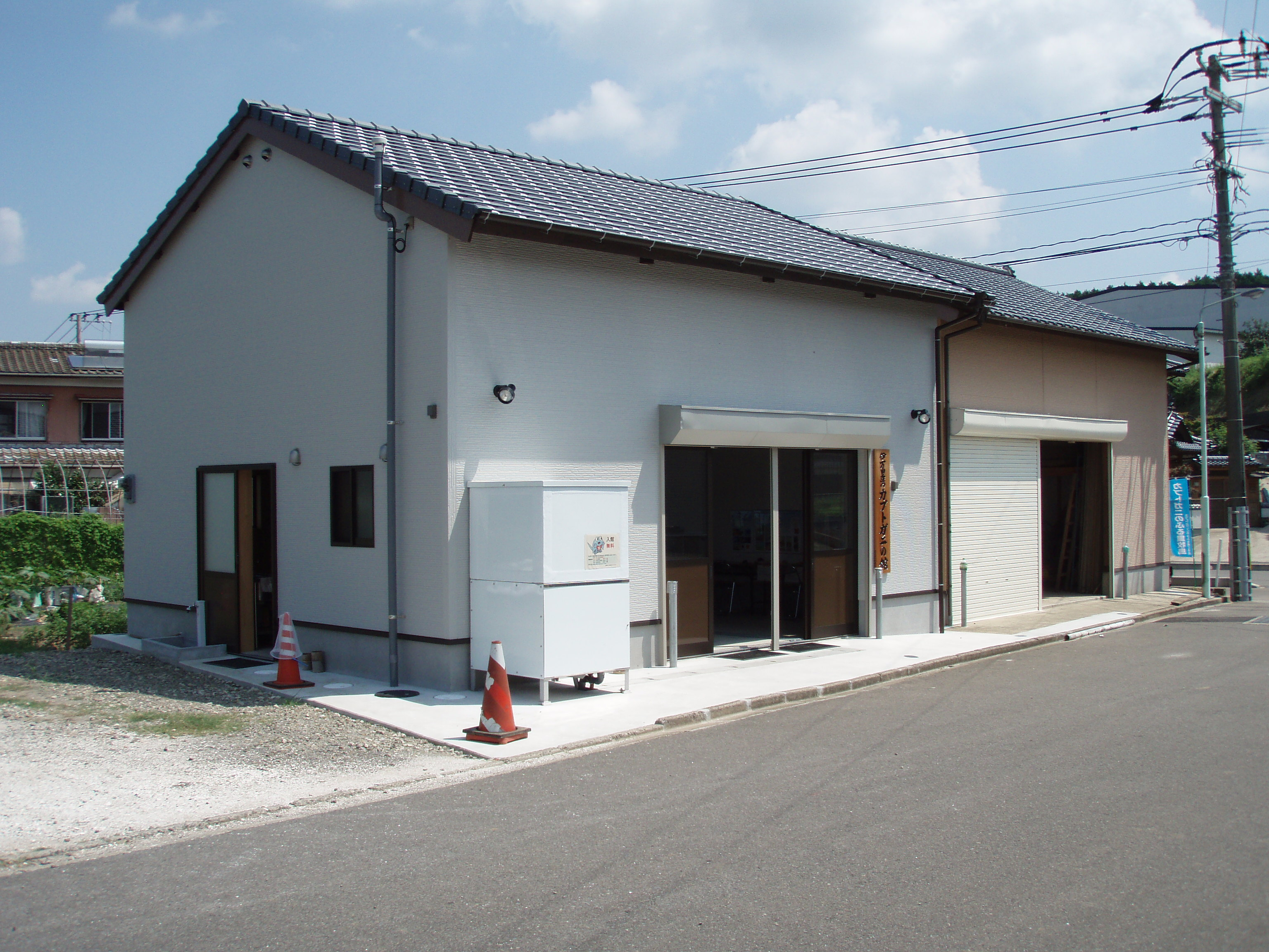 伊万里湾カブトガニの館の外観写真。自分自身での撮影。